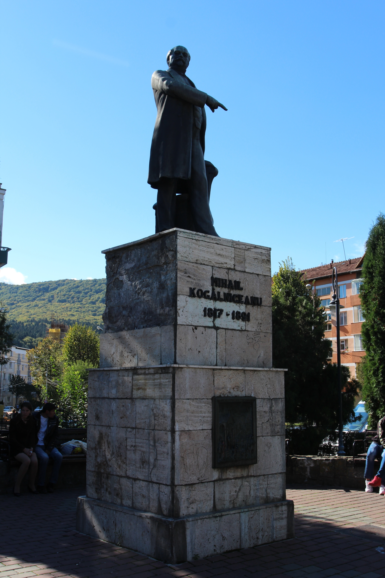 Statuia lui Mihail Kogălniceanu